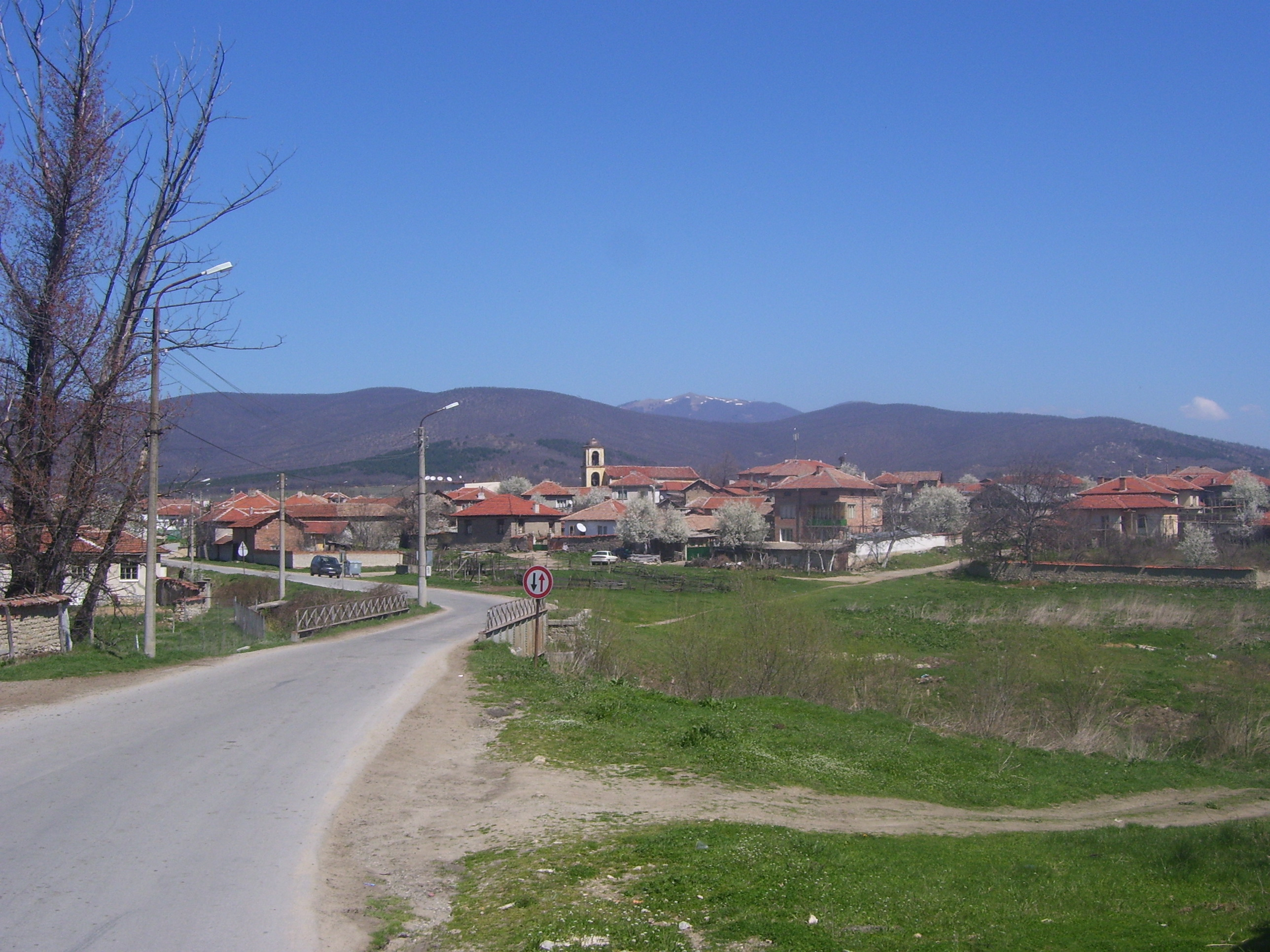 Село Красново.